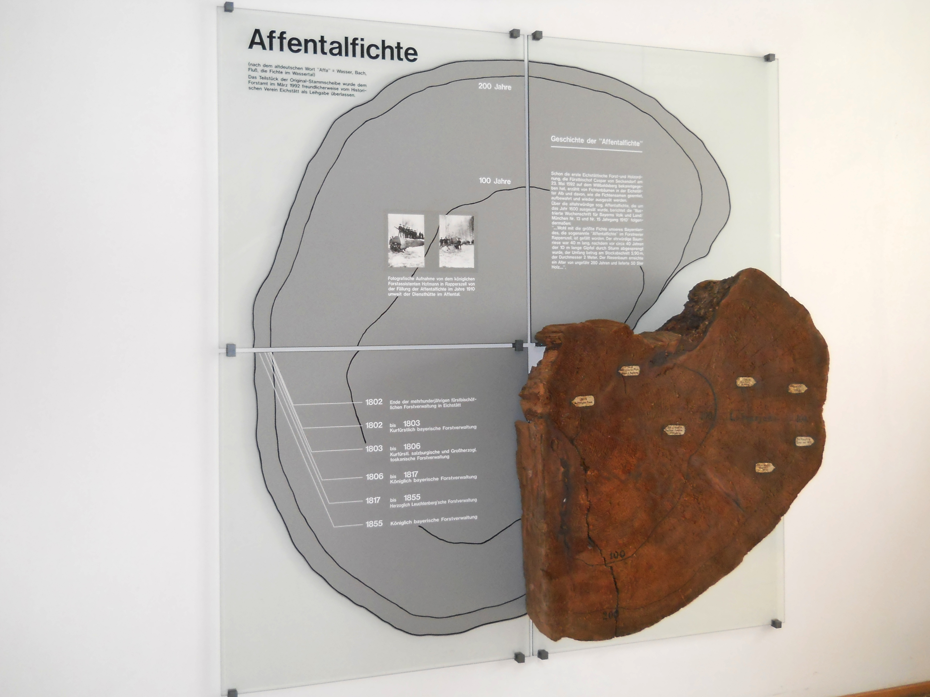 Über 200jährige Fichte vom Affentahl, Gemeinde Walting im Landkreis Eichstätt, Oberbayern